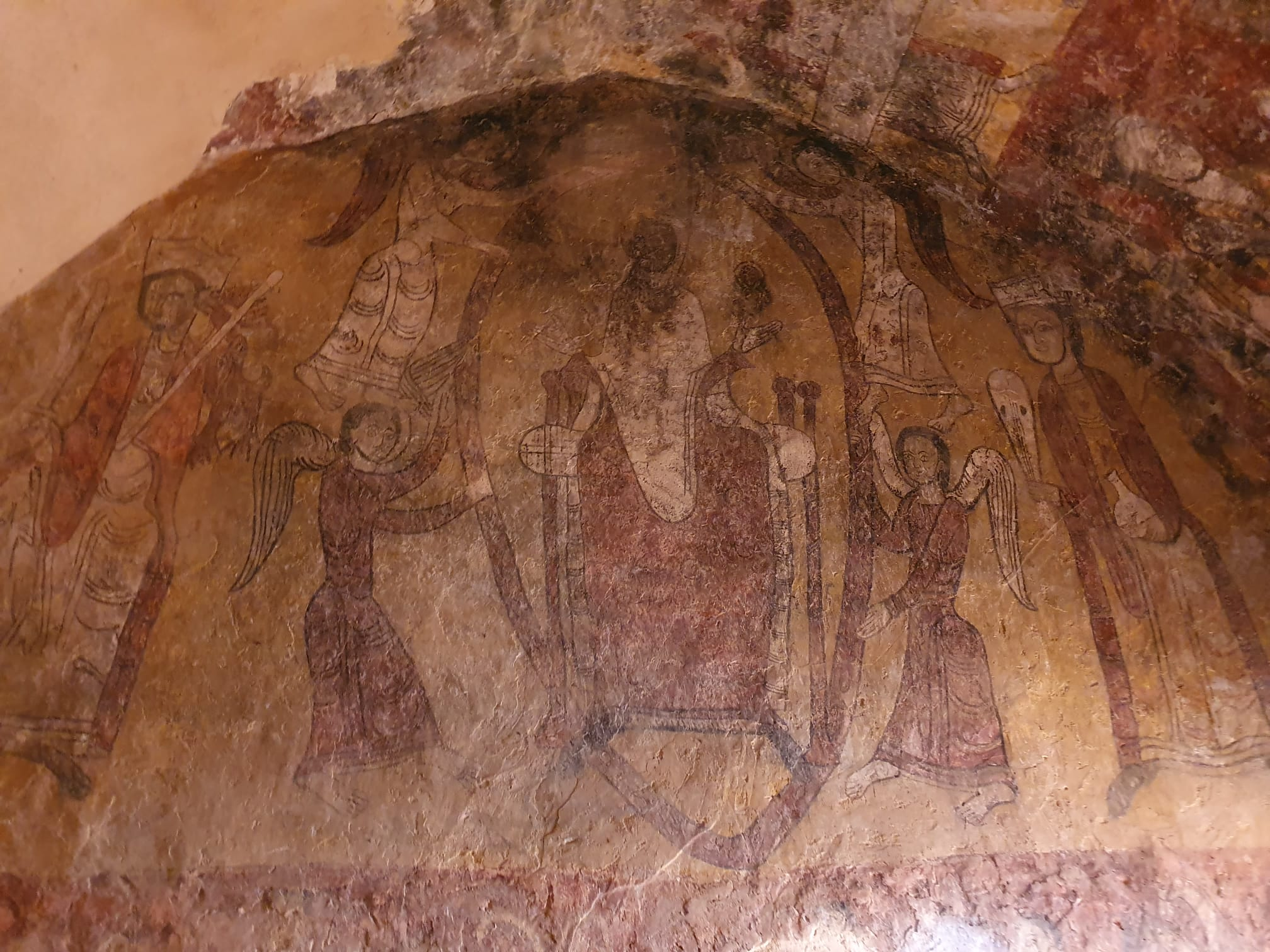 Pintura mural de la ermita San Esteban de Viguera, en Viguera, La Rioja, España. Datan del siglo XII, fecha en la que se reforma este antiguo templo visigótico. El tema que tratan son escenas del apocalipsis, esta en concreto es una Maiestas Mariae, la Virgen María en una mandorla sujeta por cuatro ángeles